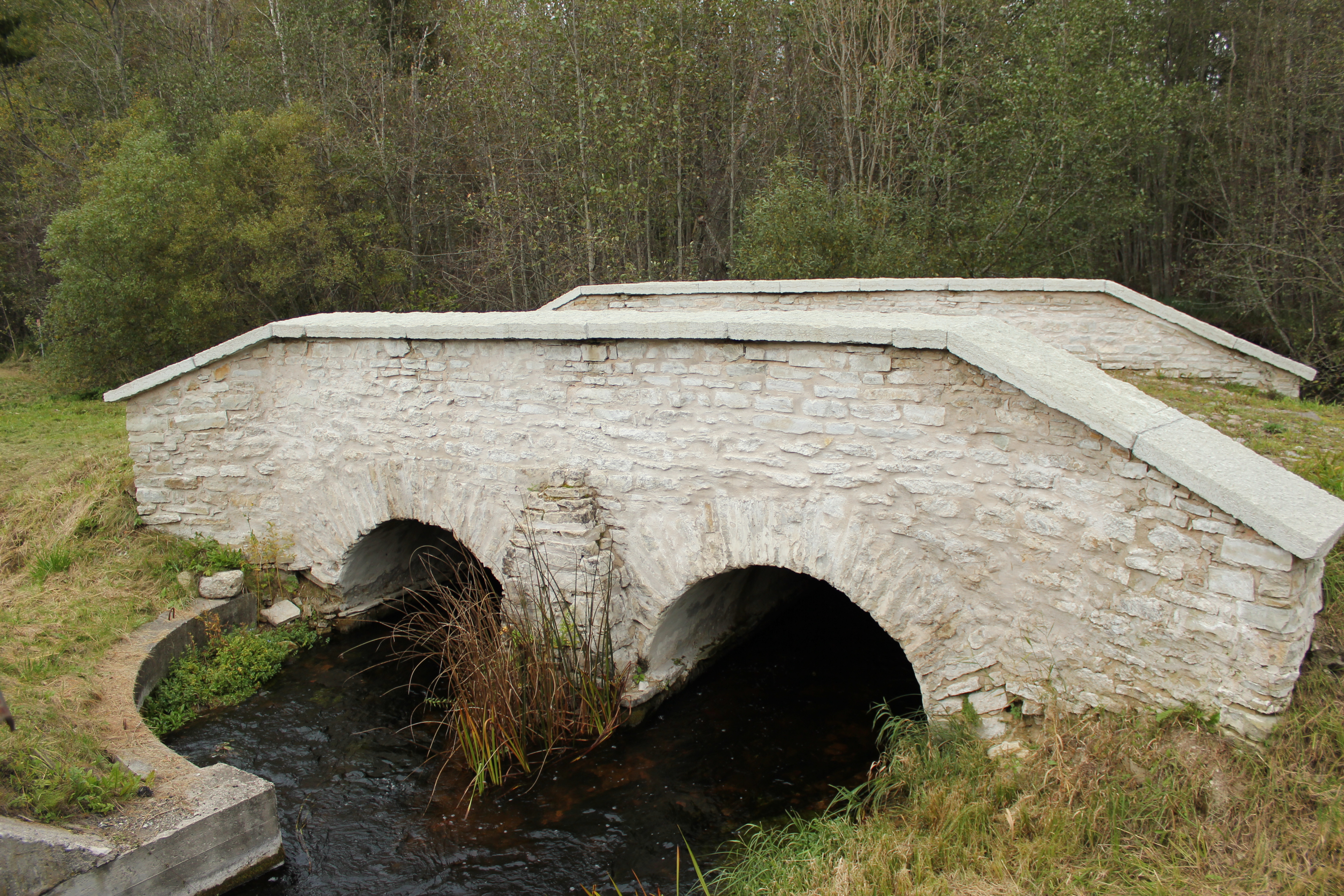 Kükita kivisild